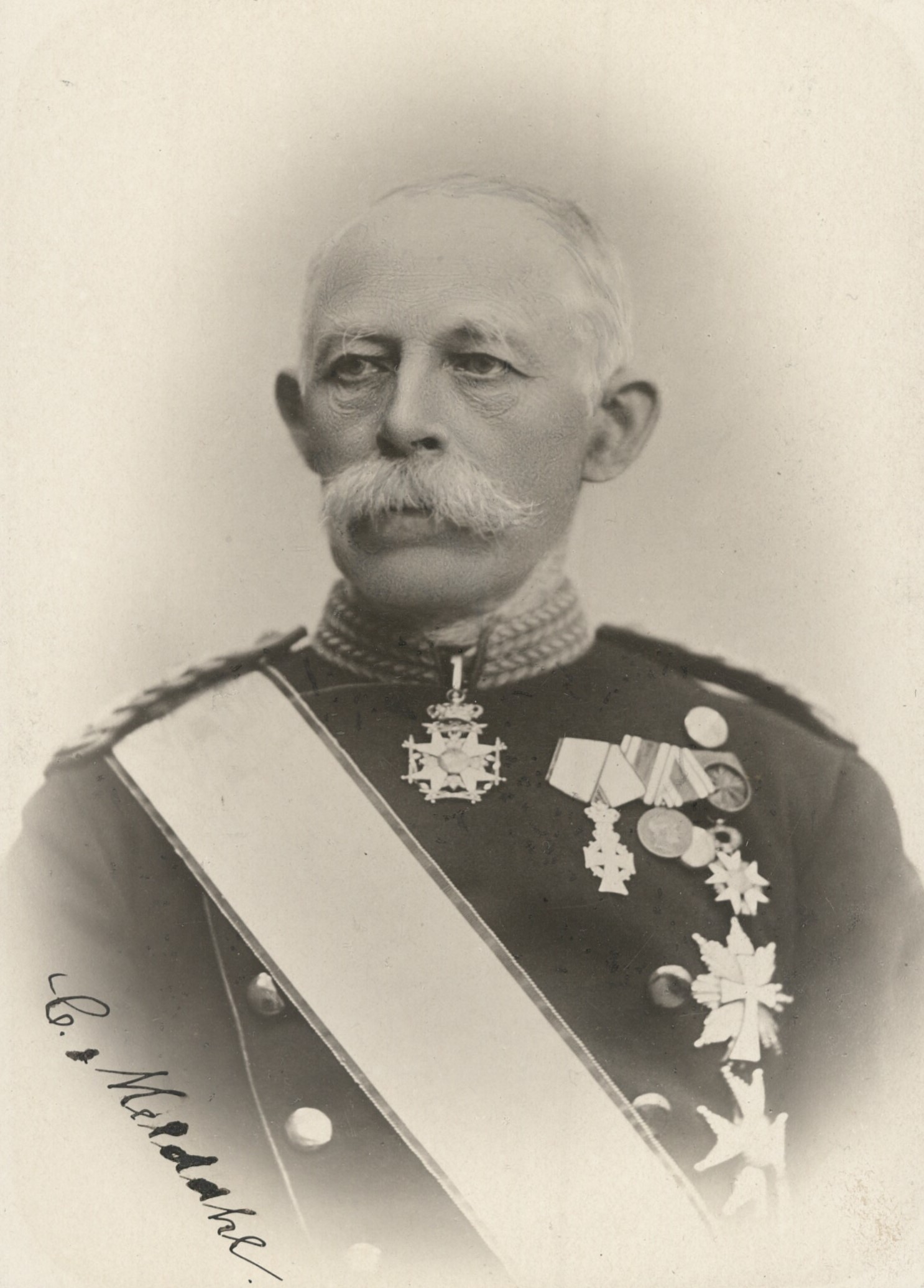 Carl Eduard Meldahl (1835-1926), Danish General